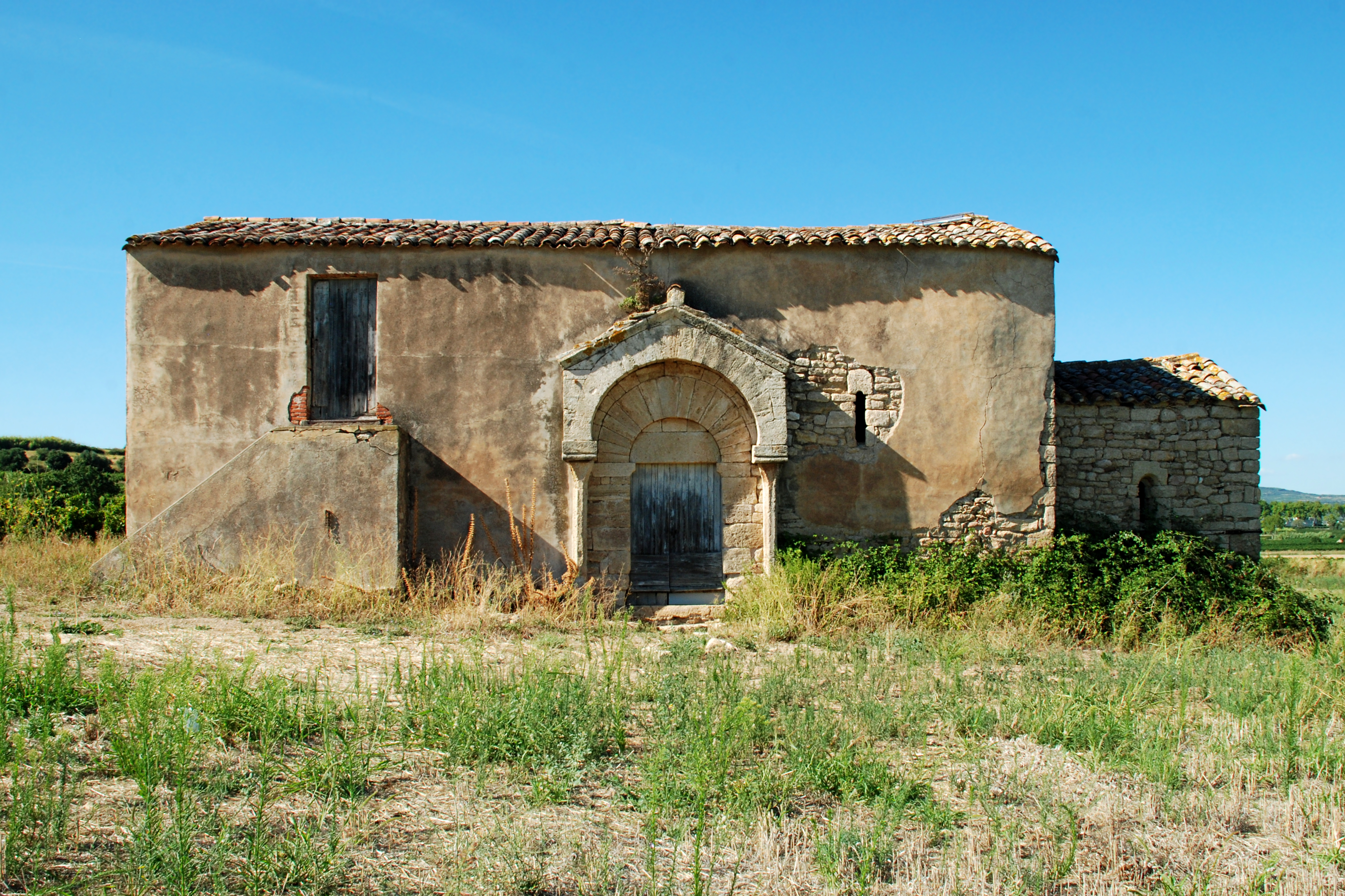 France - Languedoc - Hérault - Roujan - chapelle Saint-Nazaire